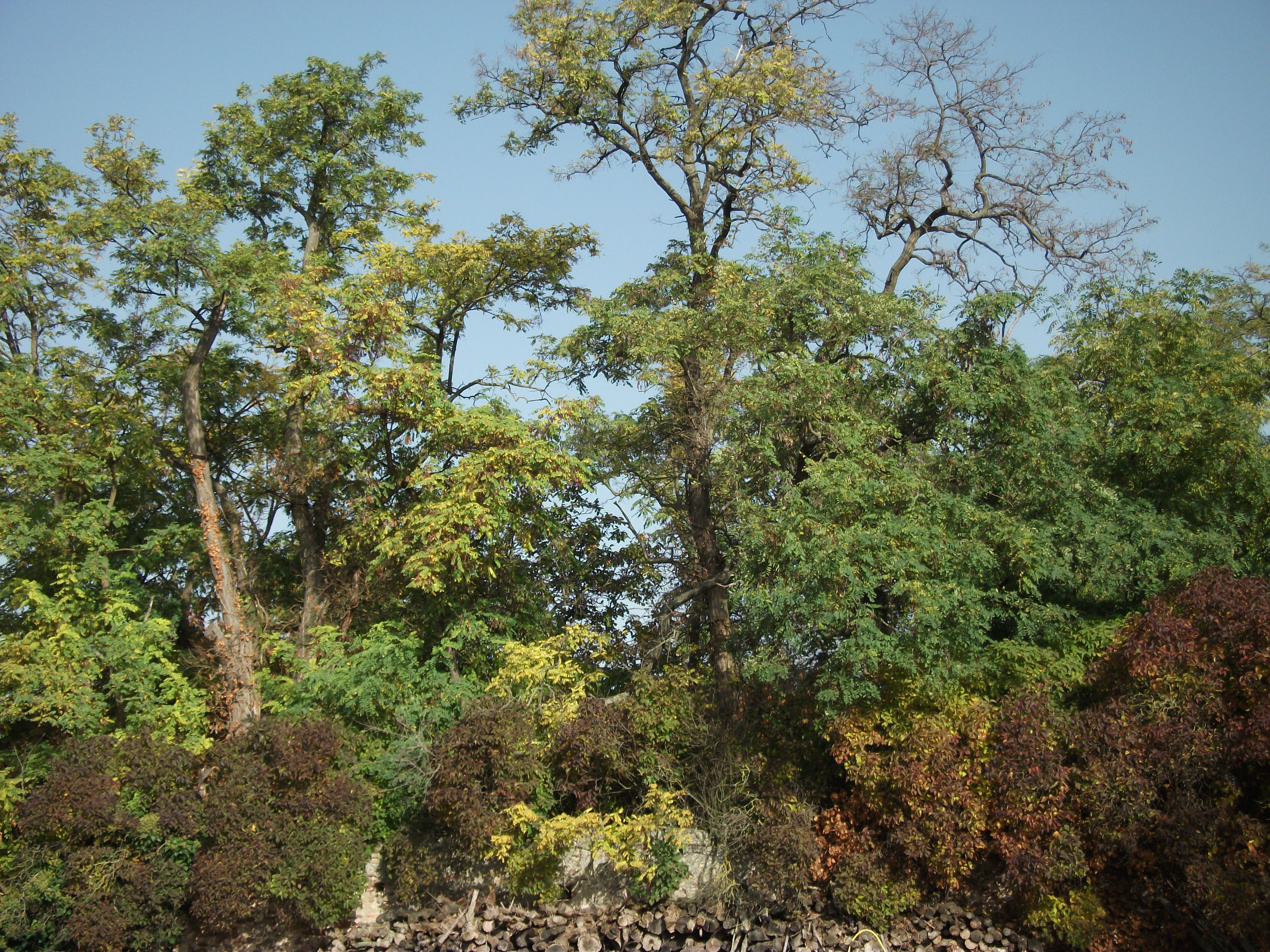 Dirmstein, Naturdenkmal Alter Friedhof, geschützter Baumbestand